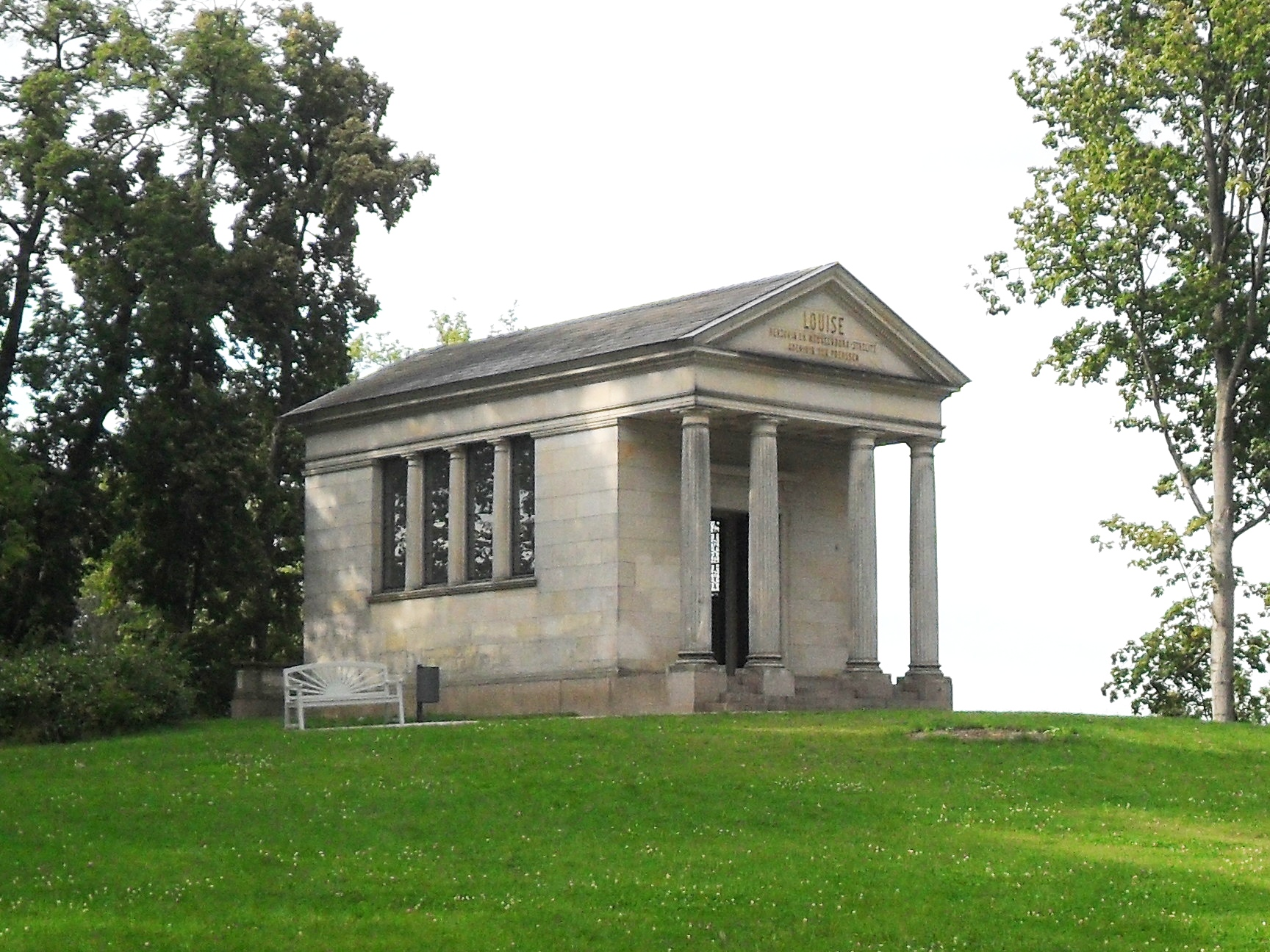 Für die 1810 auf Hohenzieritz verstorbene preußische Königin Luise von Mecklenburg-Strelitz wurde 1891 eine Gedächtnishalle in Form eines klassizistischen Tempels auf einem aufgeschütteten Hügel am Rande des Stadtparks errichtet. Im Luisentempel befindet sich eine Kopie der zweiten Fassung des von Christian Daniel Rauch 1827 für die Grabstätte der Königin im Park des Charlottenburger Schlosses geschaffenen Sarkophags. Nach einem von dieser Fassung genommenen Gipsabdruck, schuf Rauchs Schüler Albert Wolff 1891 die im Luisentempel befindliche Kopie des Sarkophags aus Carrara-Marmor.